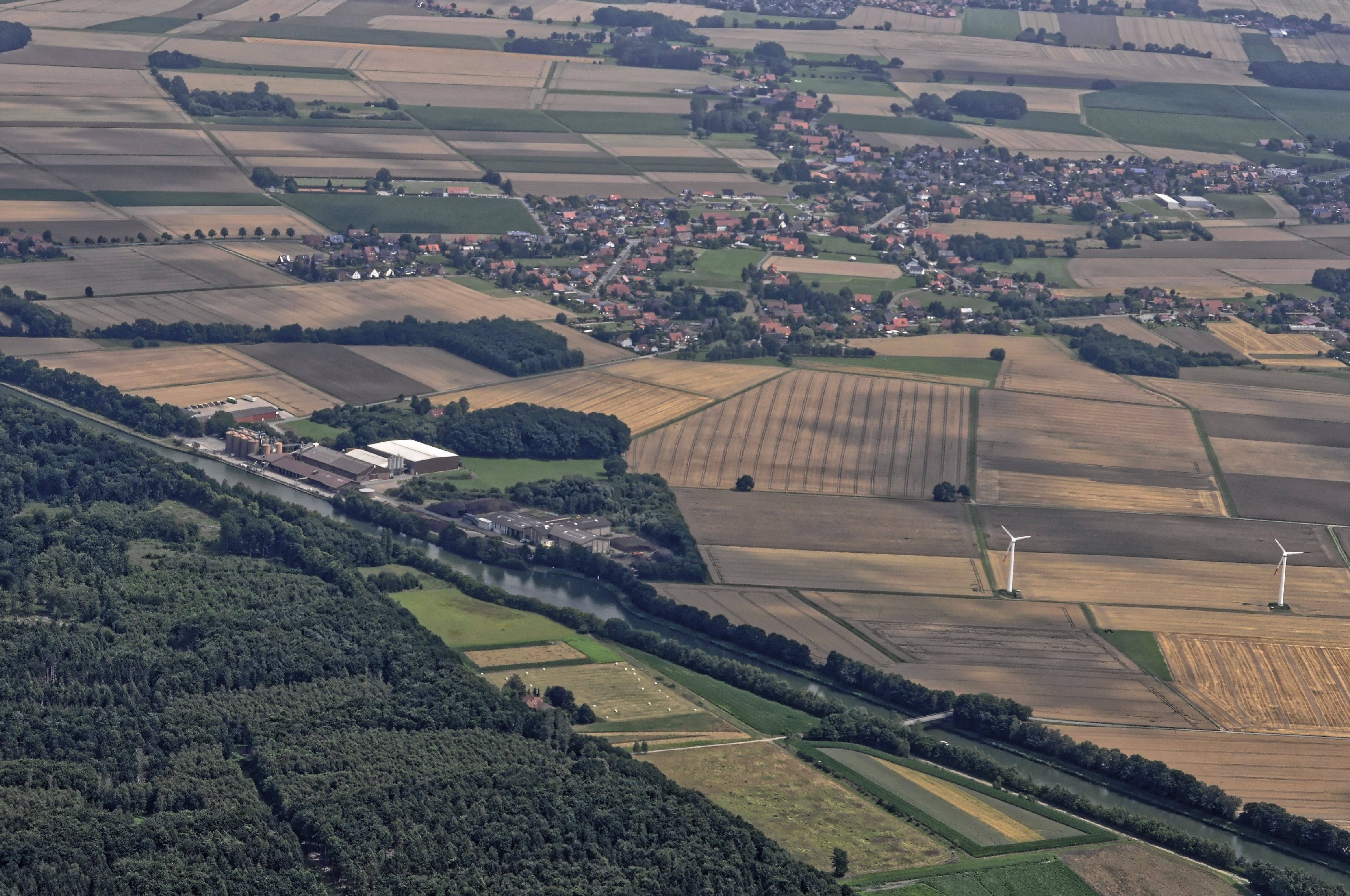 Bilder vom Flug Nordholz-Hammelburg 2015: Blick von Nordwesten über den Mittellandkanal auf den Hafen Wiehagen (vorn links), Niedernwöhren (Bildmitte) und Meerbeck (oben rechts).